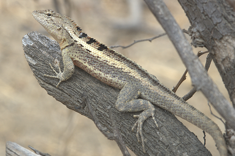 Microlophus occipitalis, Nacho Tavara (Piura, Peru). habitat: coastal desert, dry forest